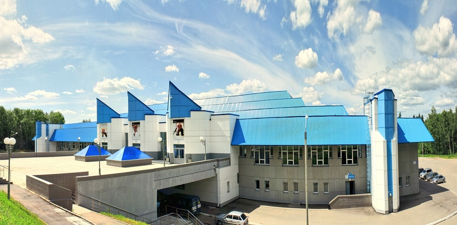 Ледовый дворец "Олимп-арена" в городе Кирово-Чепецке